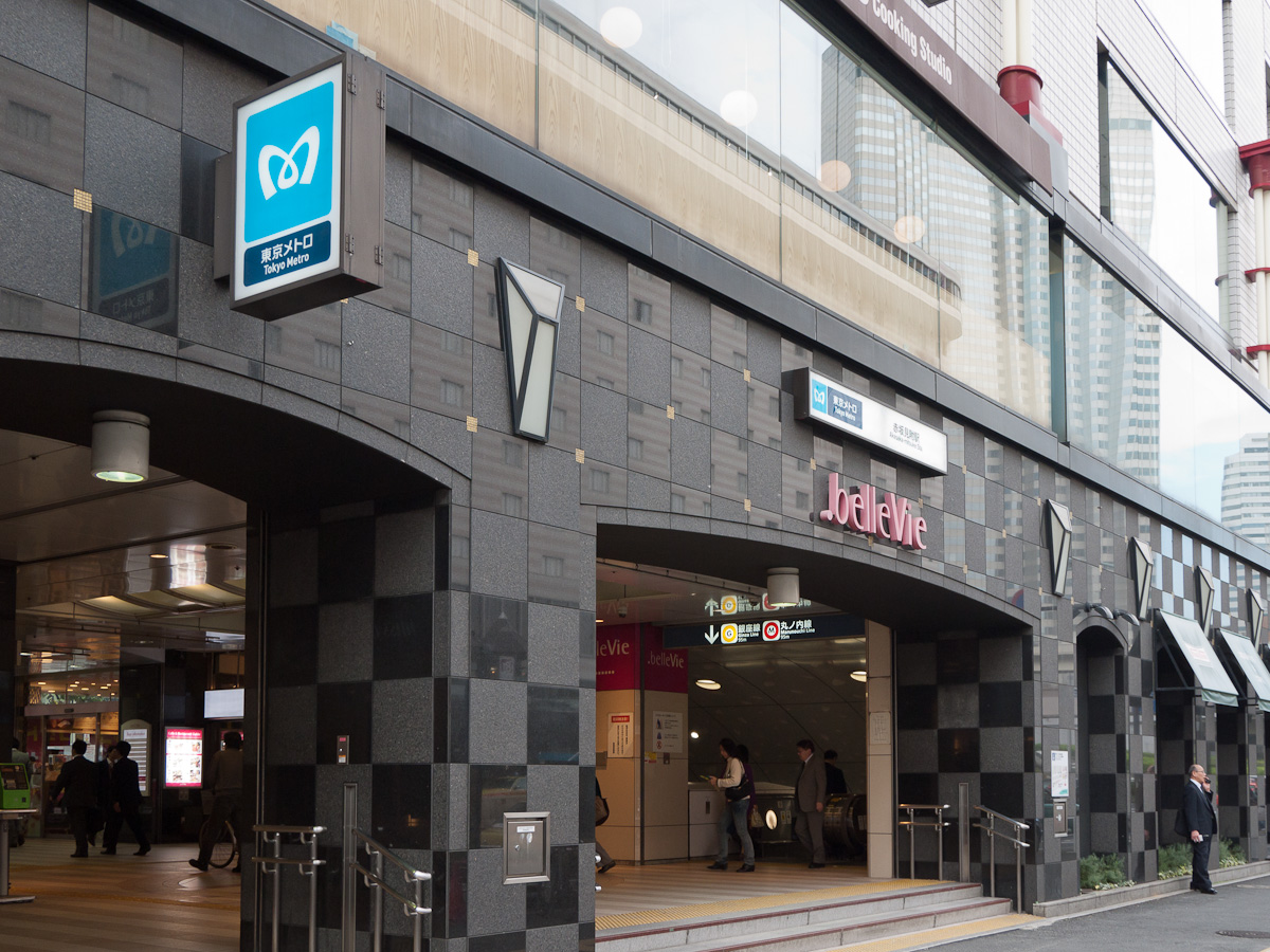 東京メトロ赤坂見附駅、ベルビー赤坂出入口。